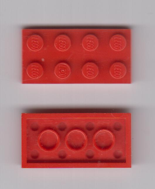 Skan płaskiego klocka LEGO.